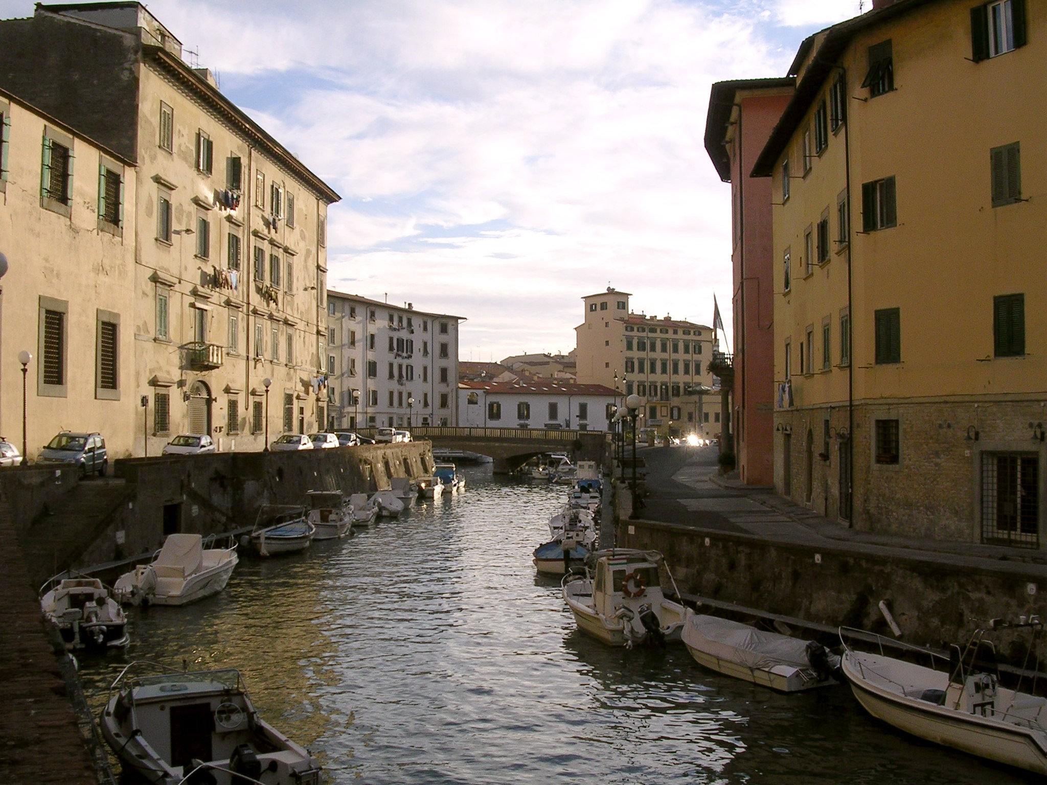 Livorno: il Fosso della Venezia, un tempo posto a difesa delle aree nord della città e successivamente trasformato in una via d'acqua all'interno del quartiere della Venezia Nuova.